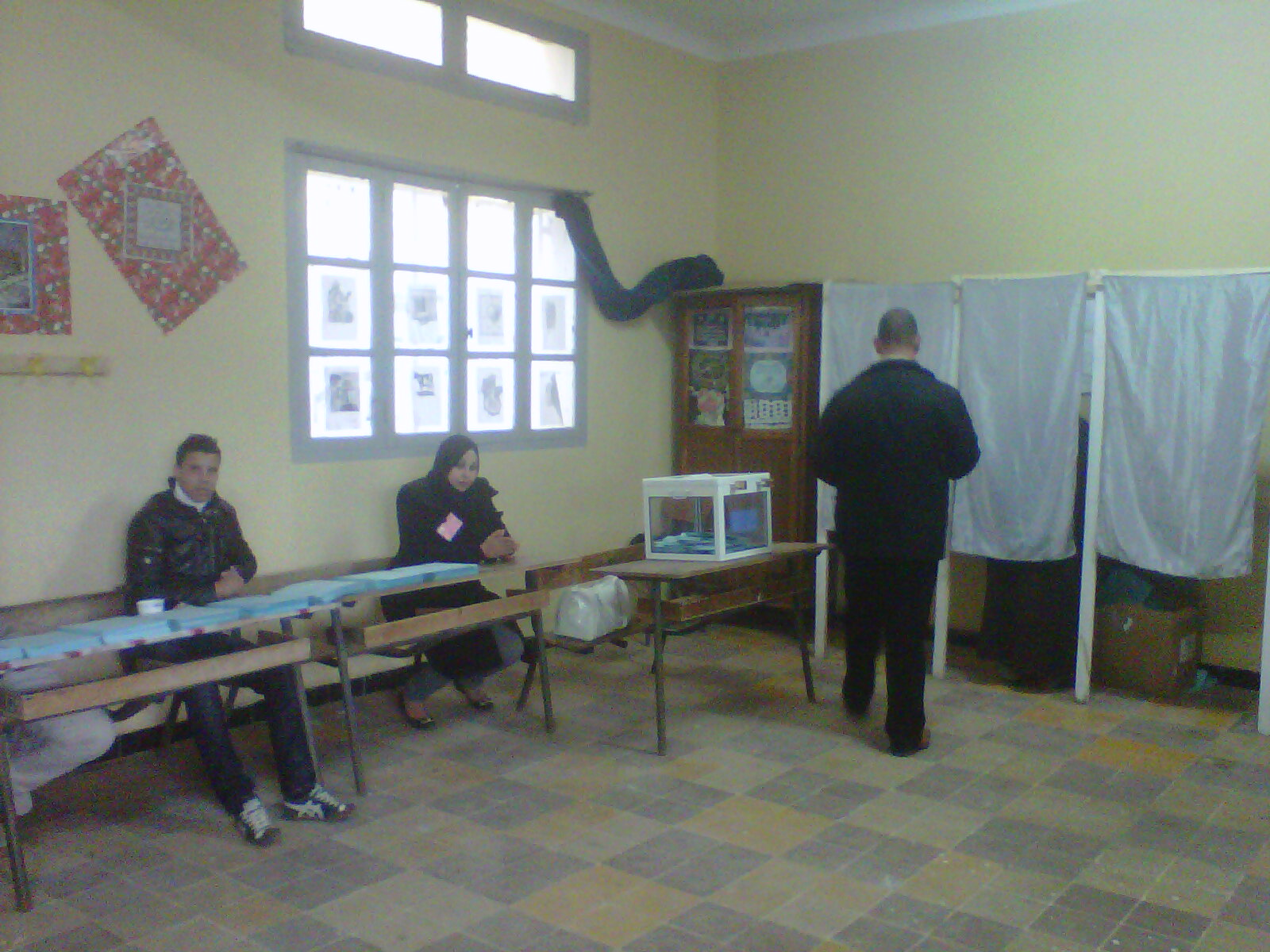 Élections locales du 29 novembre 2012 a mohammadia wilaya de mascara algerie